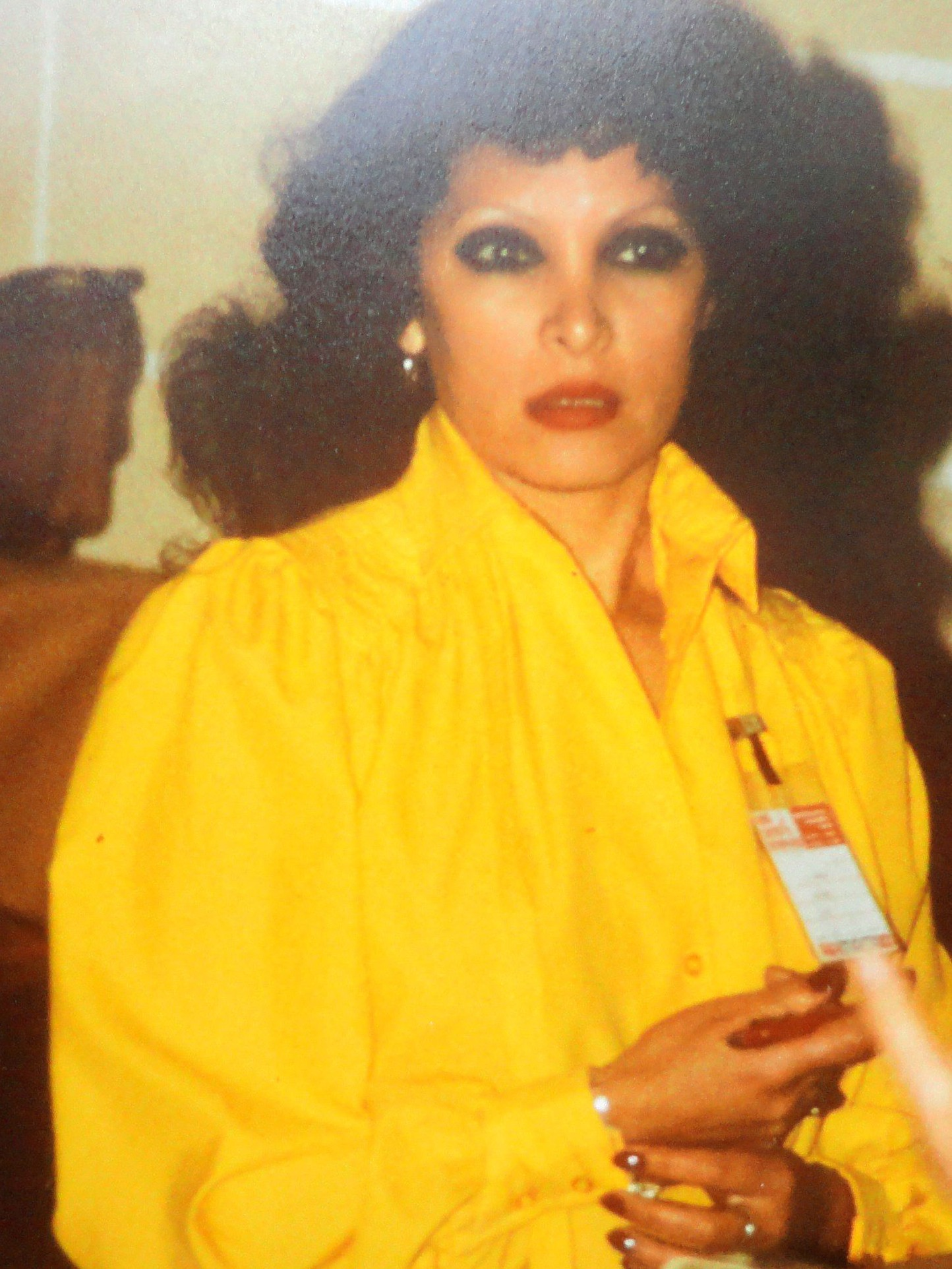 Julia Arias, Schacholympiade 1980 in Valletta auf Malta.